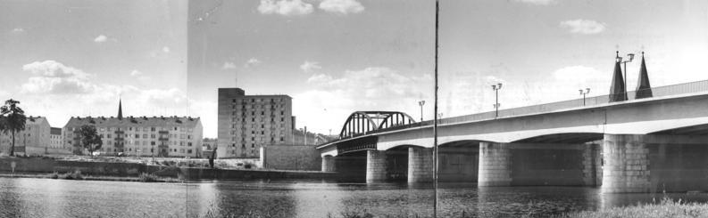 Frankfurt/Oder, Friedensbrücke Zentralbild Krisch 17.9.1964 Wir werfen einen Blick über die Friedengrenze an der Oder. So schon unsere polnischen Nachbarn den neuerbauten Teil der Innenstadt von Frankfurt-Oder. Rechts ist die Friedensbrücke zu sehen, die beide Länder verbindet. Seit Gründung der DDR wurden in der Bezirkshauptstadt rund 5000 Wohnungen errichtet. Die Stadt war im zweiten Weltkrieg zu mehr als zwei Drittel zerstört worden.